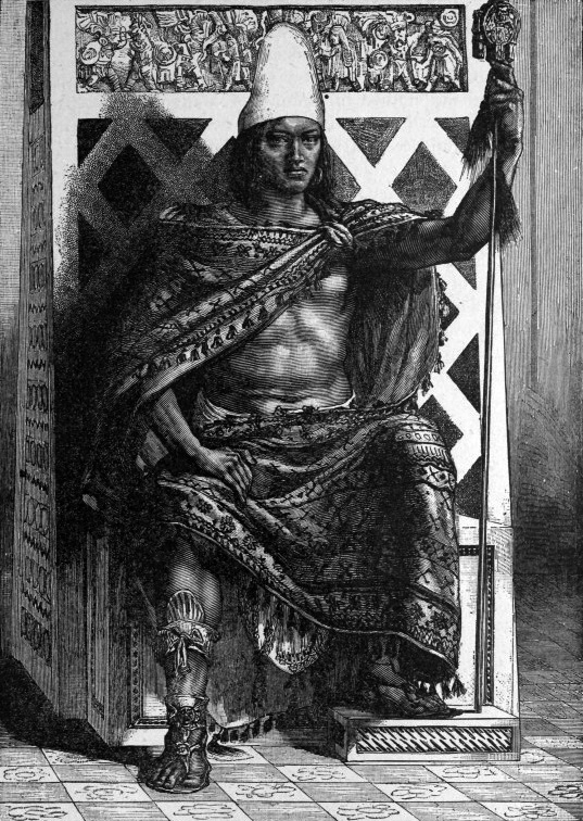 Grabado subtitulado "The emperor Moctezuma", perteneciente a la obra "The discovery and conquest of the new world : containing the life and voyages of Christopher Columbus", publicada en Estados Unidos en 1892.